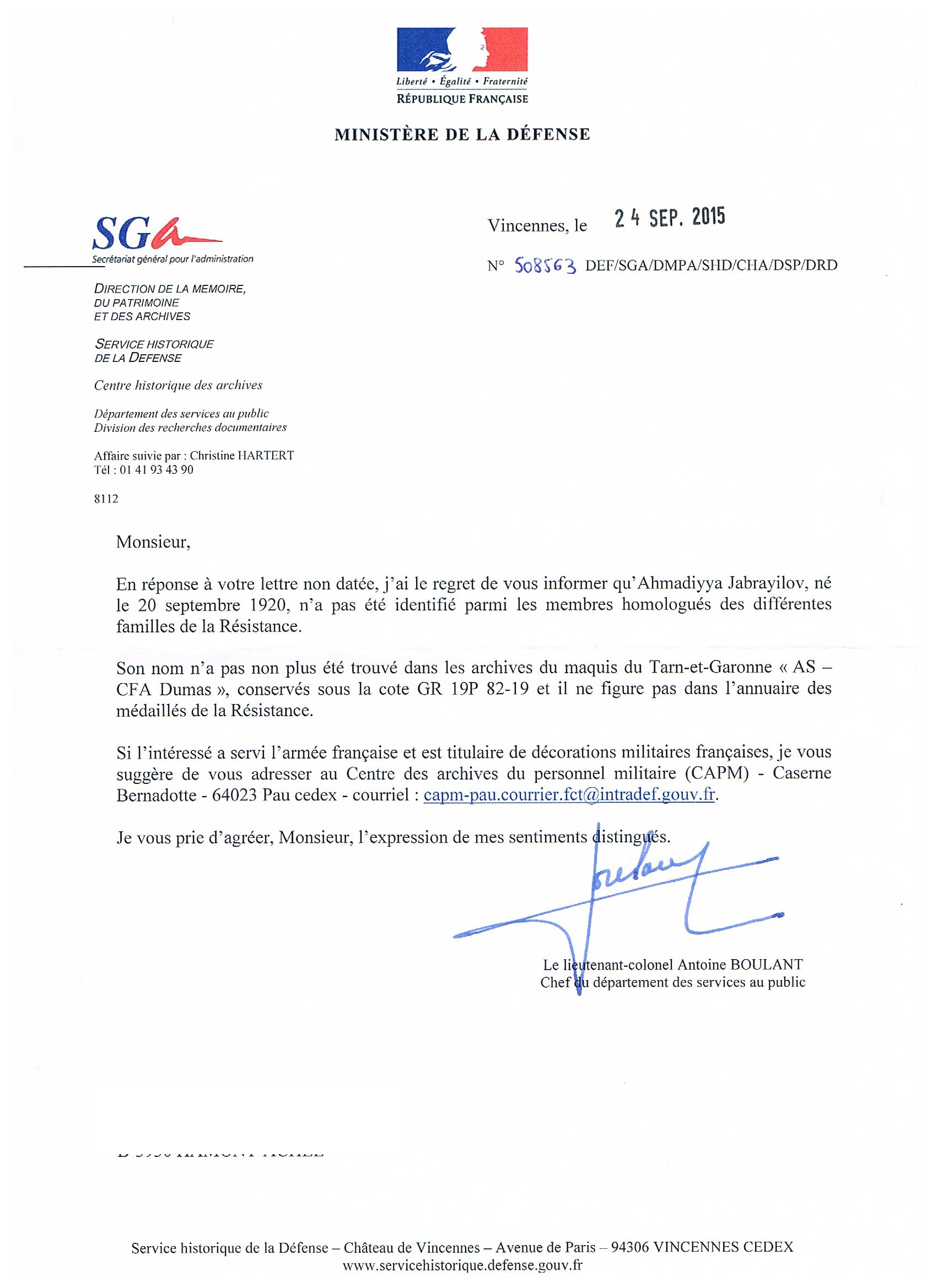 Ответ Service historique de la Defense